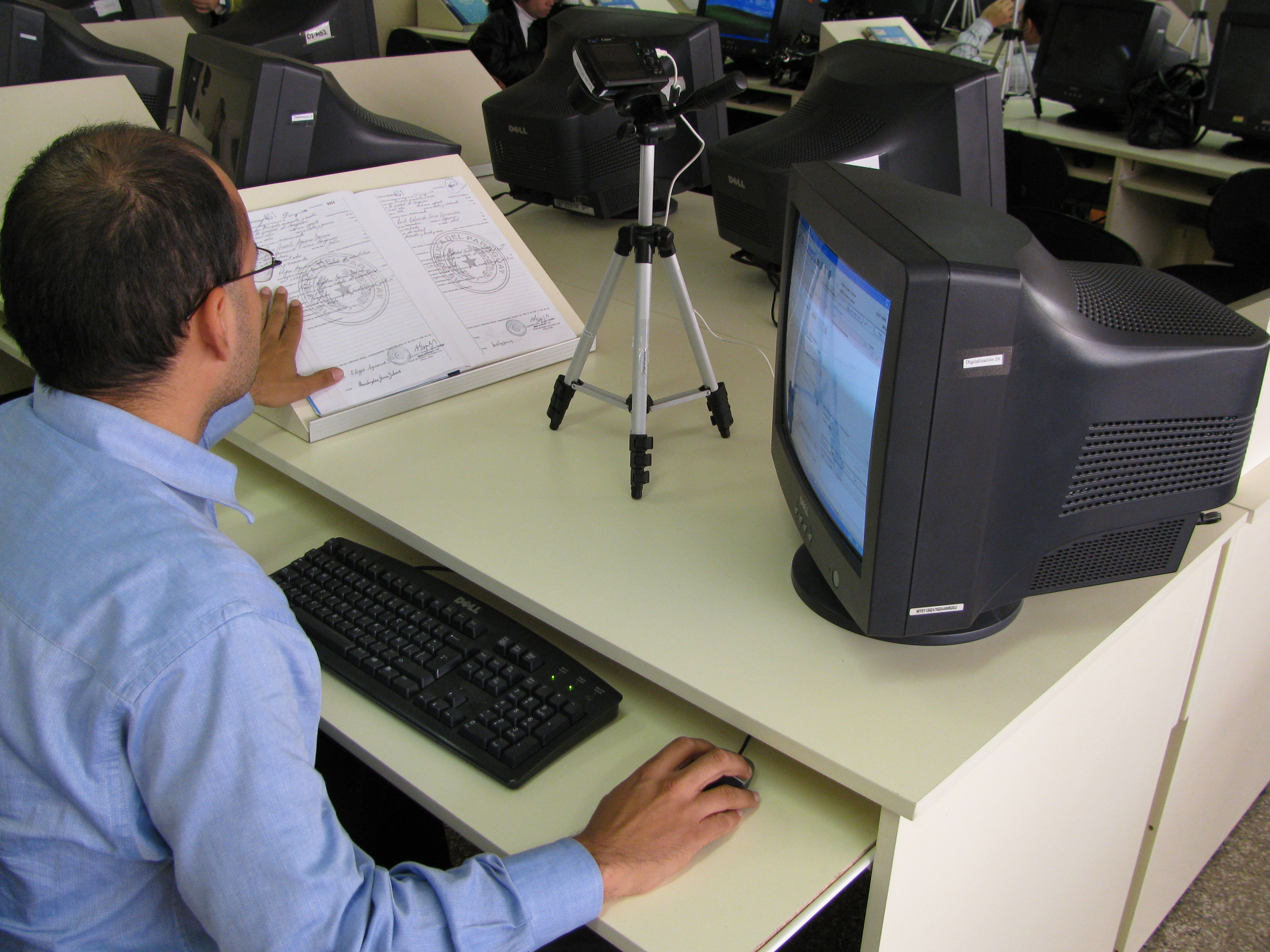 Proceso de dcigitalización de actas de nacimiento para su incorporación a una base de datos digital